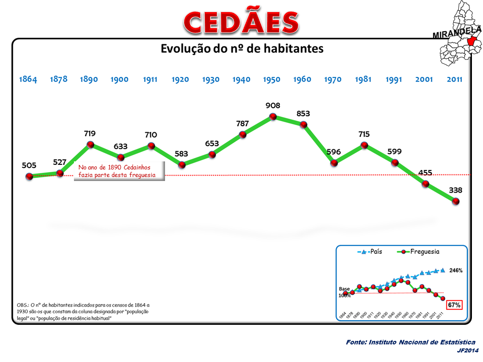 Evolução da População 1864 / 2011